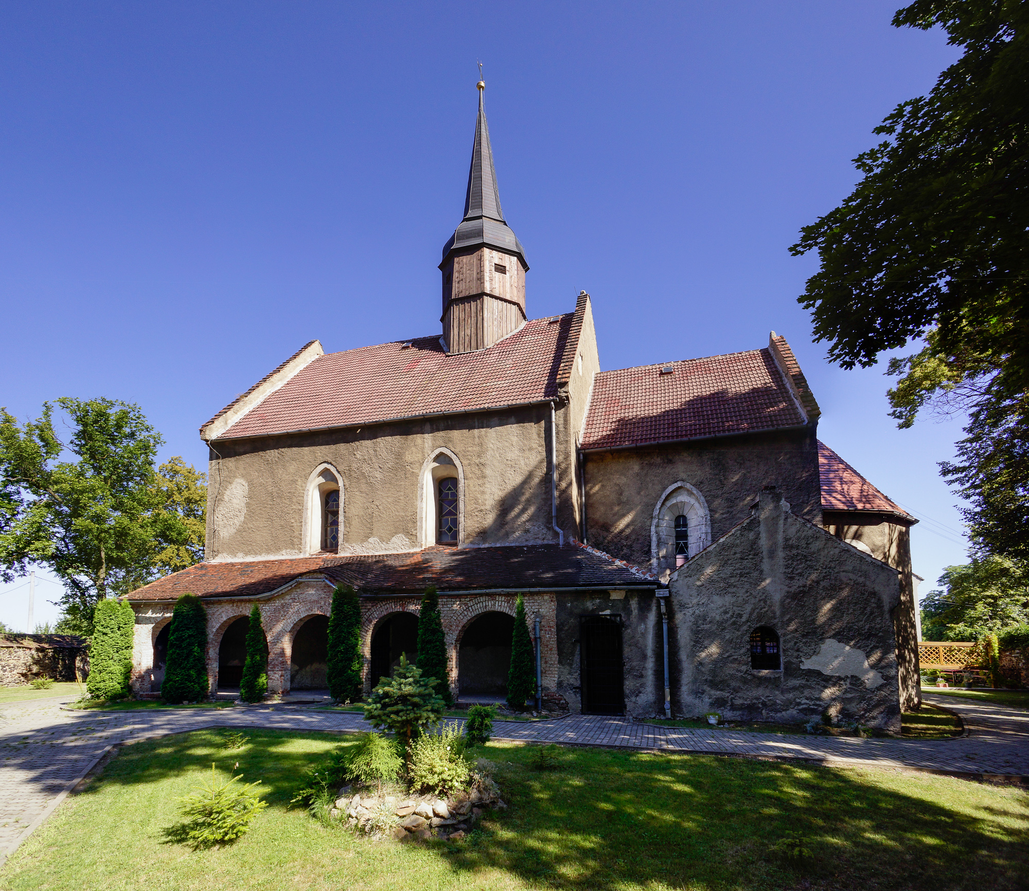 Jędrzychowice, kościół ewangelicki, ob. rzym.-kat. fil. p.w. Narodzenia NMP, XVI w.